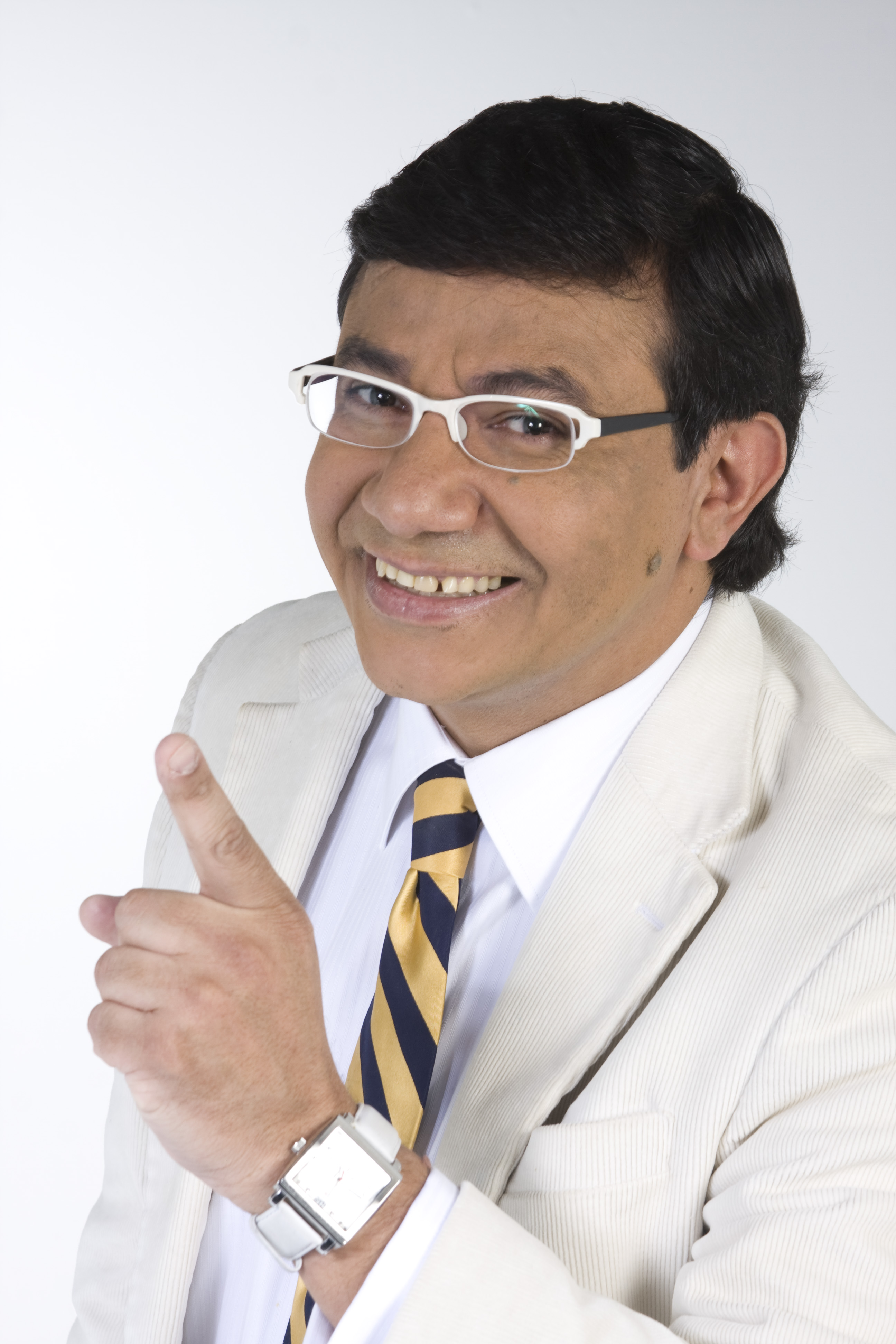 Luis "Moncho" Martínez, humorista y actor que es conductor de ¡Qué Locura!, un programa de televisión venezolano de género comedia producido y transmitido por la cadena Venevisión.